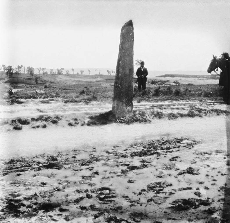 La Pedra dreta del Grau, a Lluçà. Cèsar August Torras i Ferreri (ca. 1910)